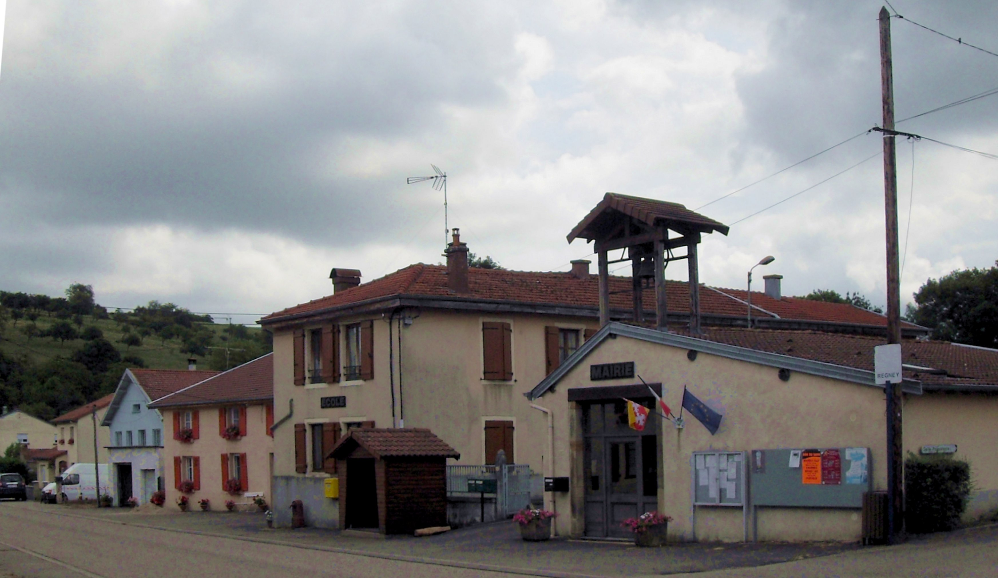 La mairie et l'école de Regney